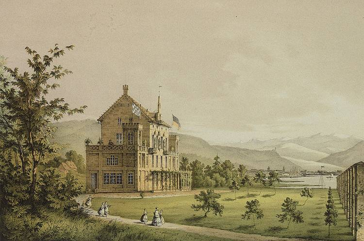 Villa Leuchtenberg in Lindau. Besitzerin die durchlauchtigste Prinzess Theodolinde von Württemberg, getönte Lithographie von W. F. E. Bollmann (1825-1892) nach Zeichnungen des Architekten Anton Harrer, aus dem Album Erinnerungen an Lindau am Bodensee und dessen Umgebung, München um 1855; 24 x 36 cm